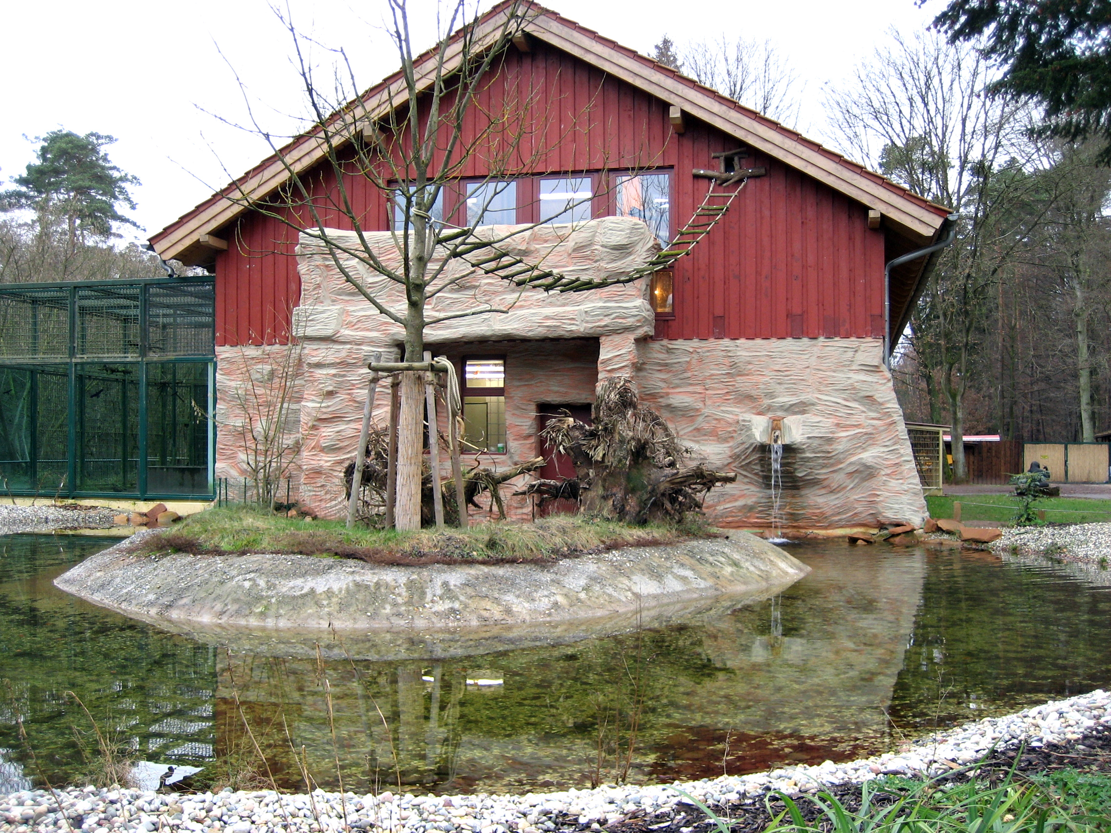 Runderneuertes Affenhaus- und Freigehege im Zoo Kaiserslautern, 2007.